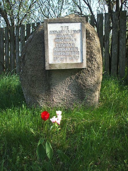 Памятны знак аб Сцяпане Некрашэвічы ў Данілоўка (Краснаўскі сельскі Савет, Светлагорскі раён, Гомельская вобласць). Усталяваны ў 1993 г. ля месца былога фальварку Некрашэвічаў (цяпер — вул. Я. Коласа). Зроблены з гранітнага валуна, на якім умацавана шыльда з надпісам: "Тут нарадзіўся і жыў беларускі мовазнаўца Сцяпан Міхайлавіч Некрашэвіч. 8.05.1883 — 20.12.1937."